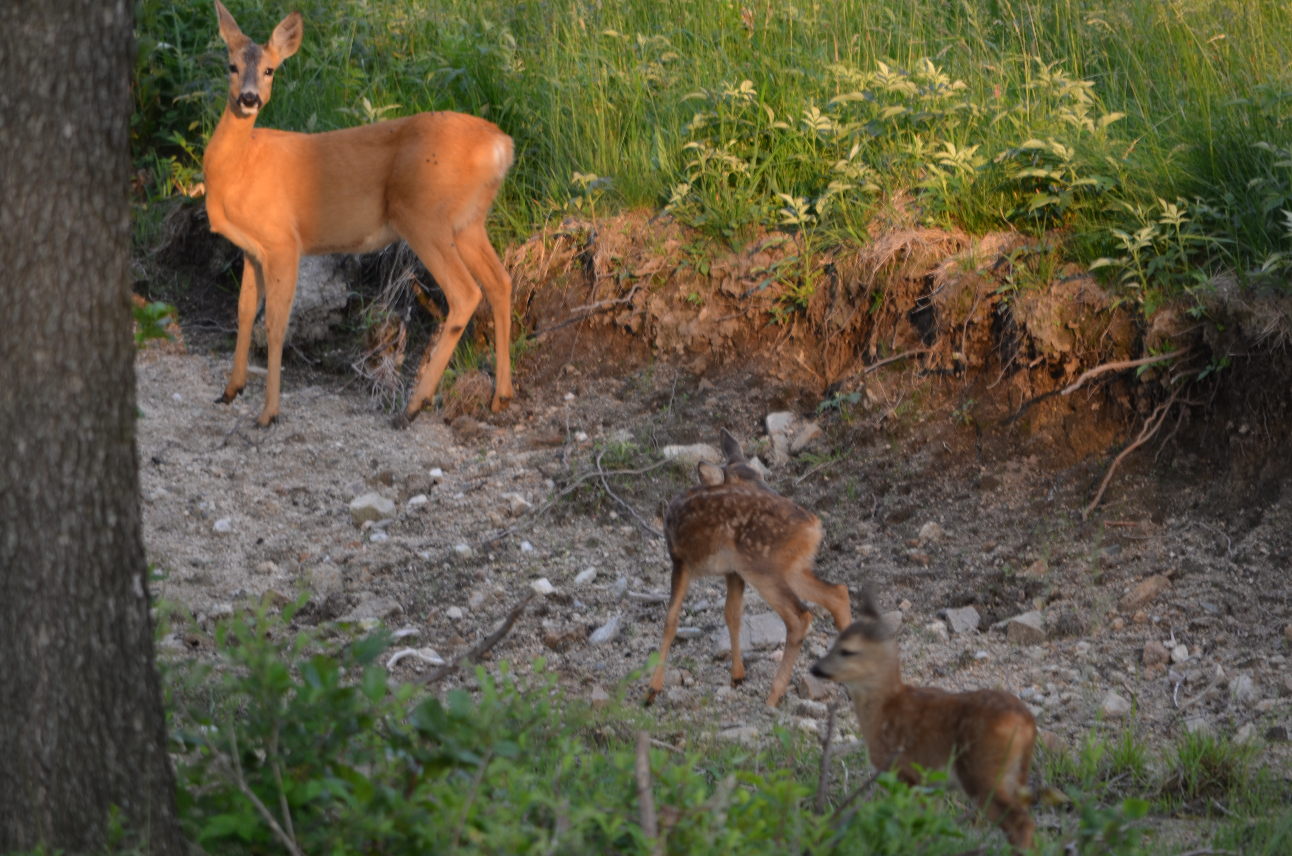 Sarna z małymi